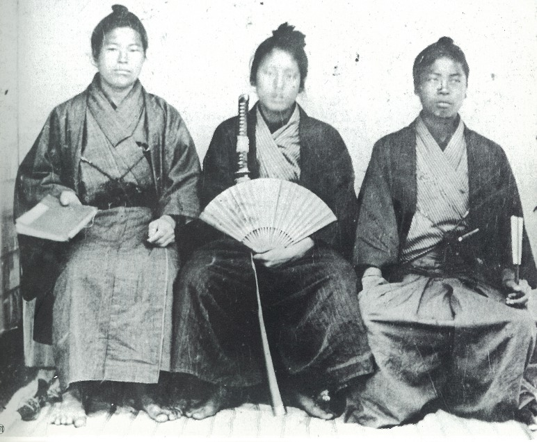 高知中城家蔵、中央が菅野覚兵衛（千屋寅之助）、左右の人物未詳